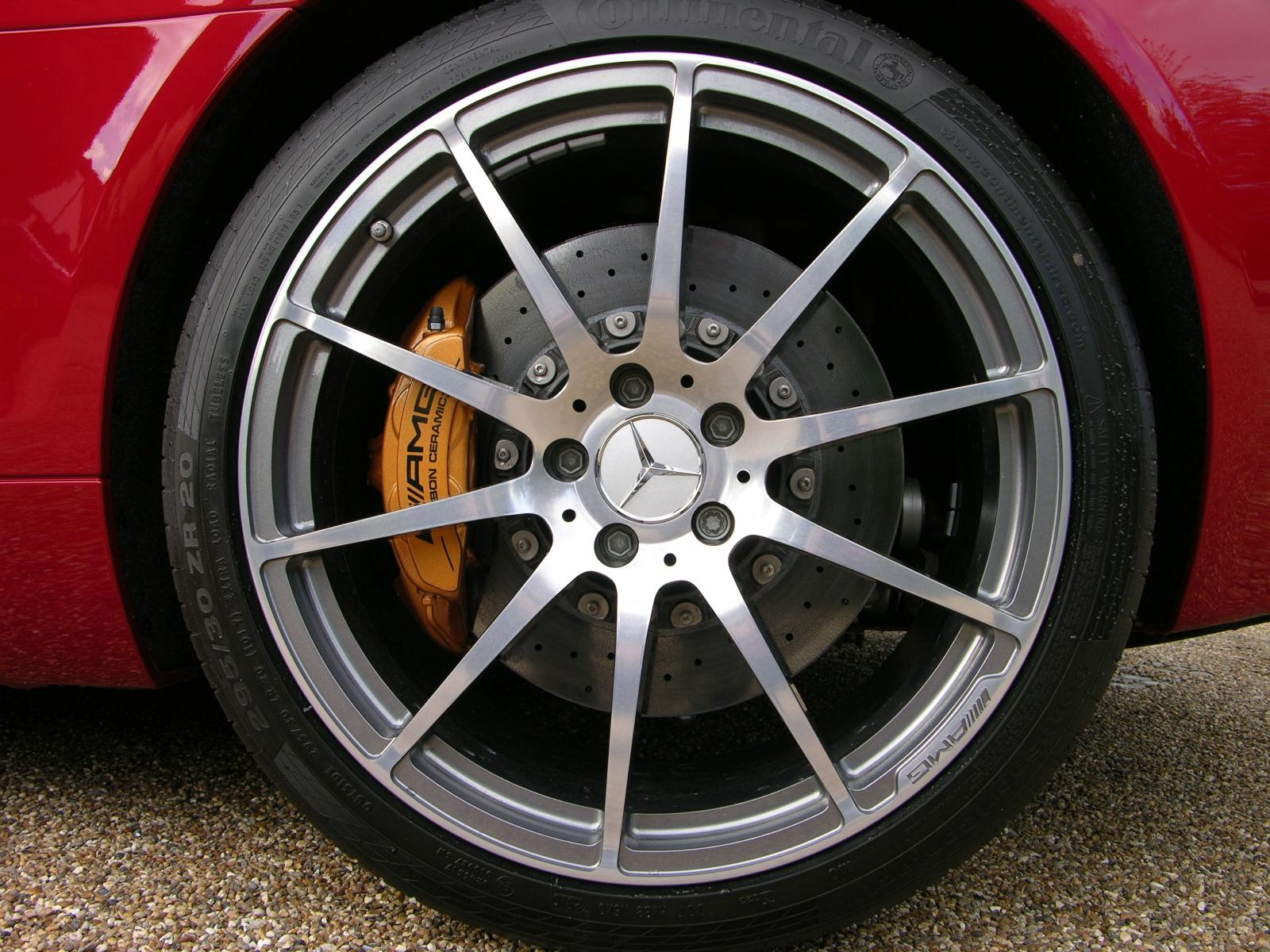 Mercedes Benz SLS AMG